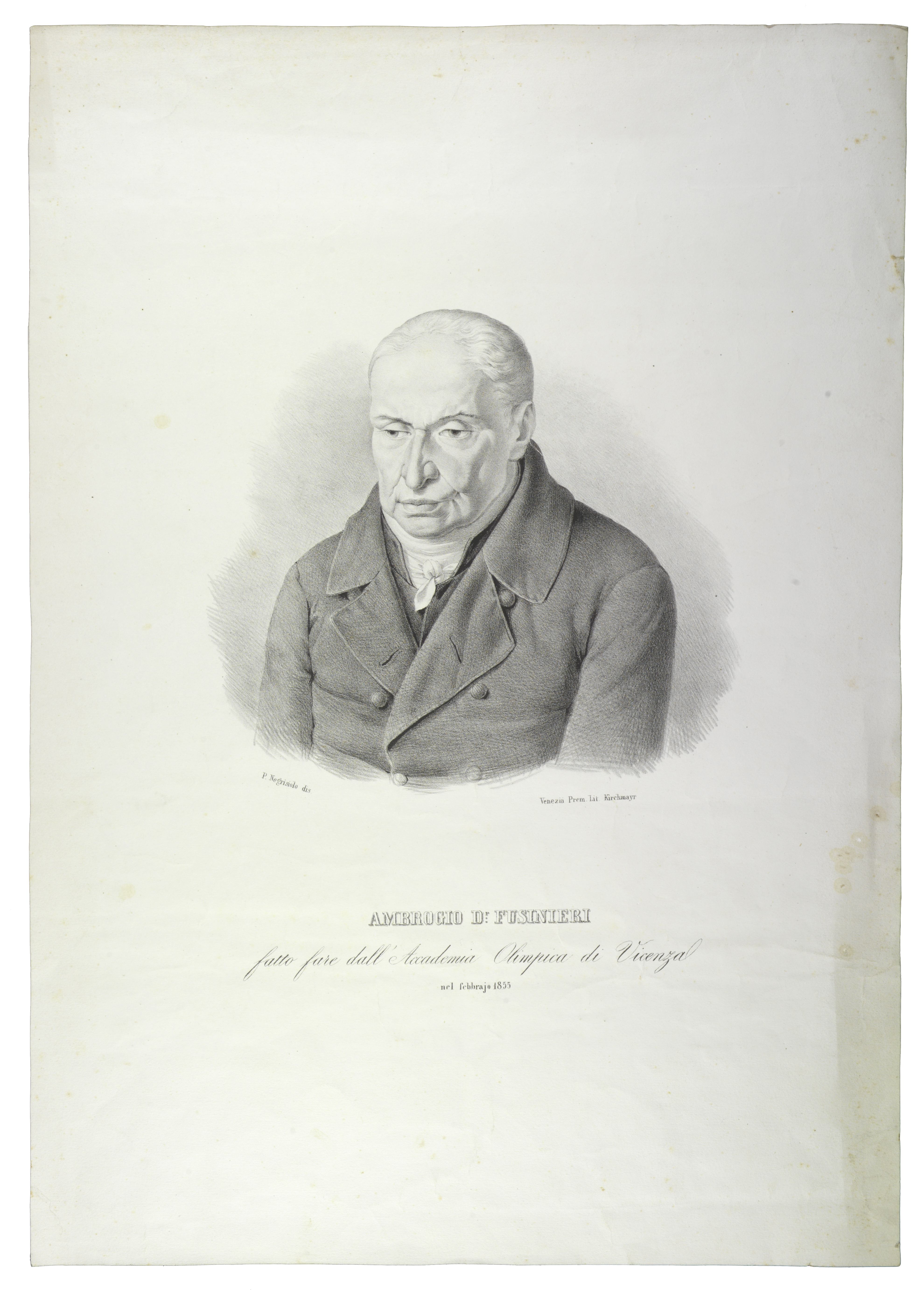 Lo scienziato Ambrogio Fusinieri. Litografia di P. Negrisolo, 1855